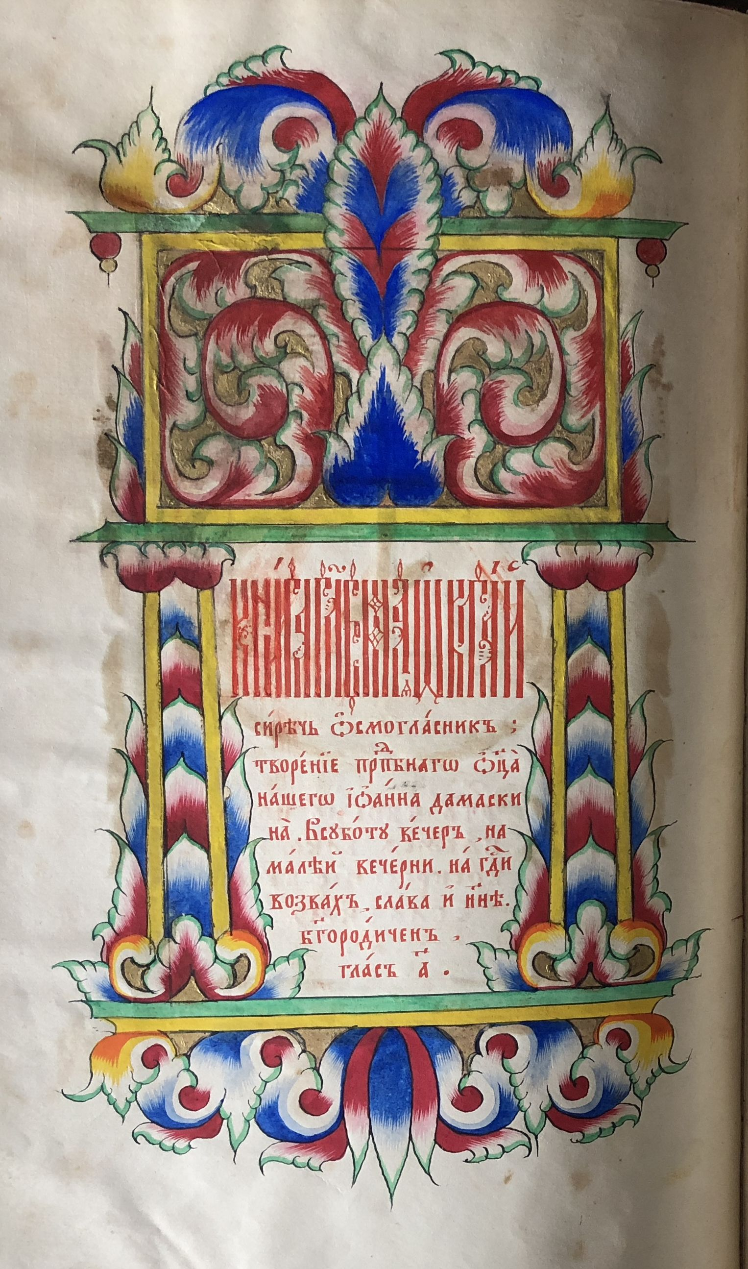 Рукописный Октаих (Гуслицы, конец 19 века; частное собрание)